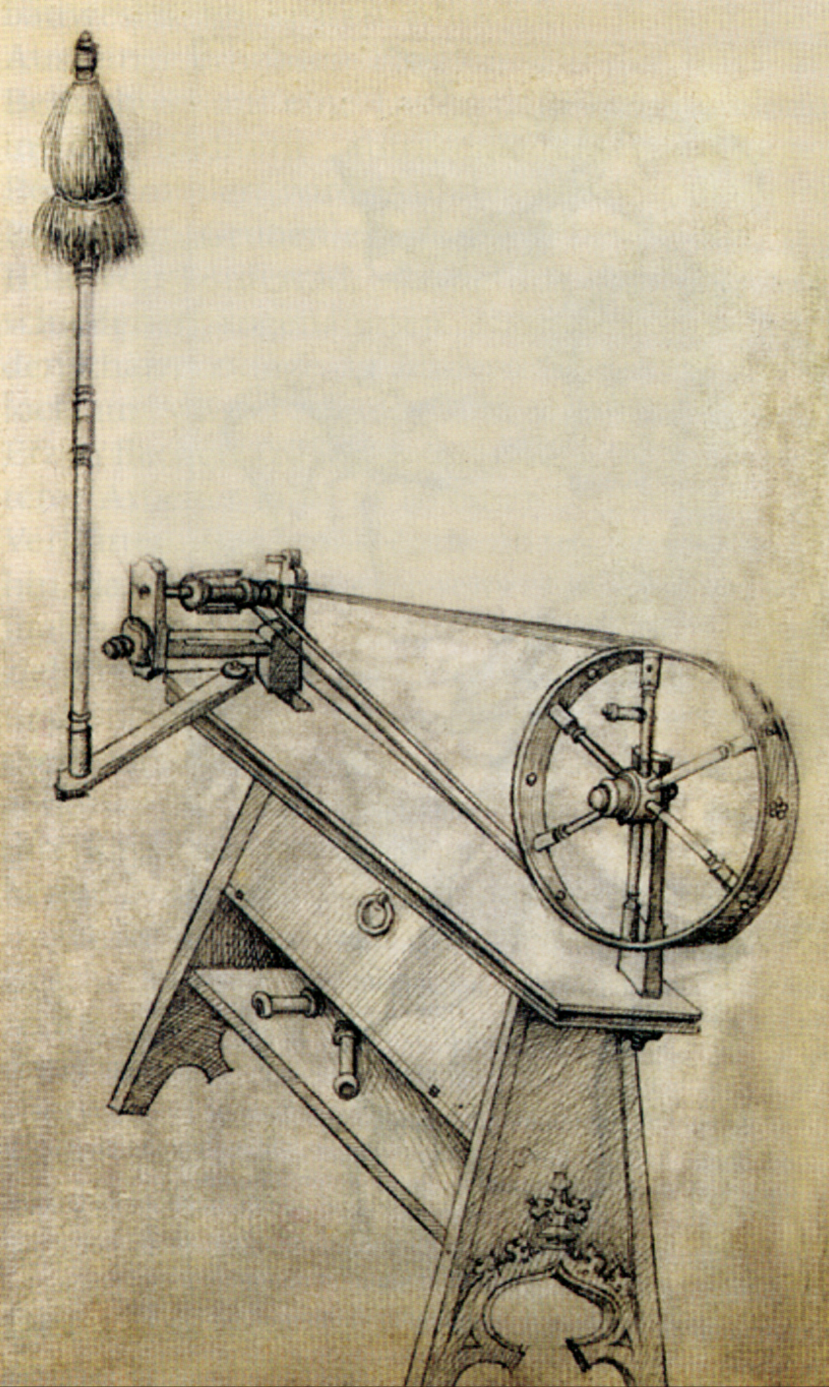 Mittelalterliches Hausbuch von Schloss Wolfegg Fol. 34r: Das Spinnrad (beschnittene Abbildung)